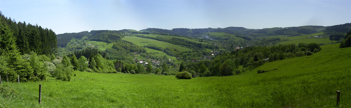 Pohled na Růžďku od Pálenisk